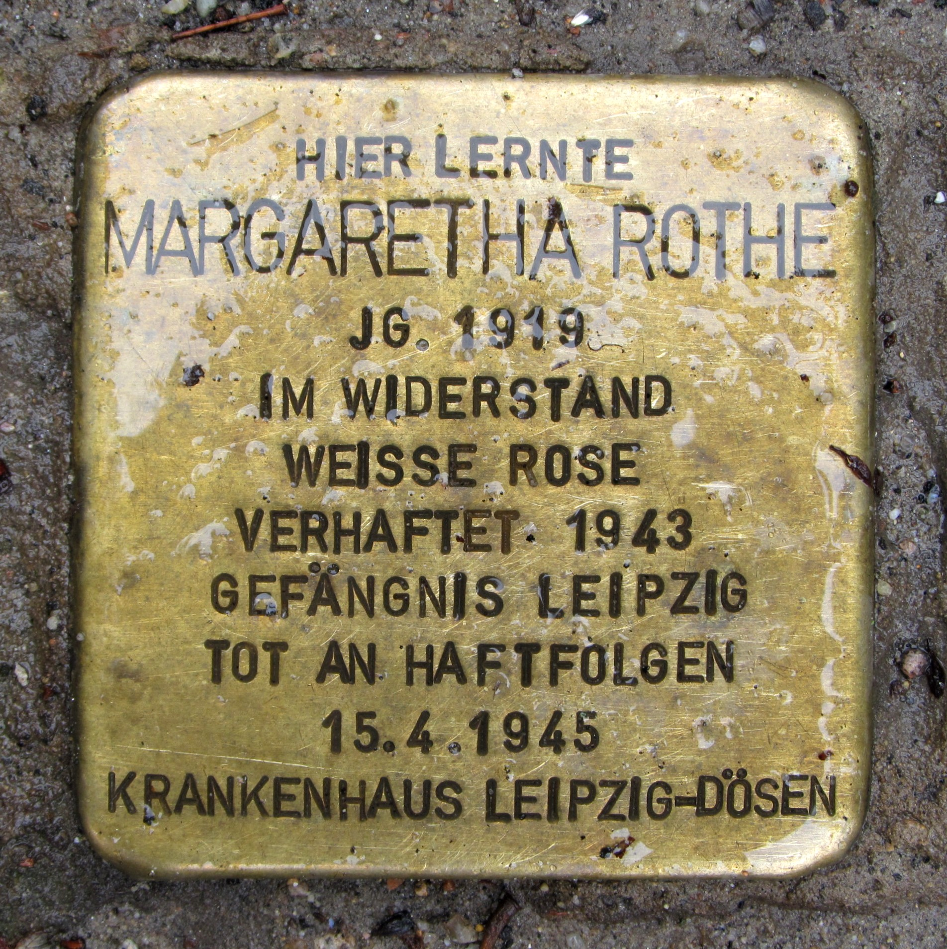 Stolperstein für Margaretha Rothe in der Einfahrt zum Schulhof des Gymnasiums Klosterschule, Bei der Hauptfeuerwache